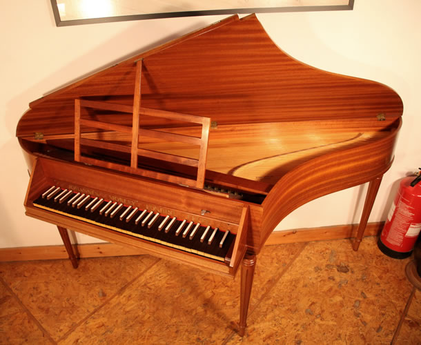 اسپینت